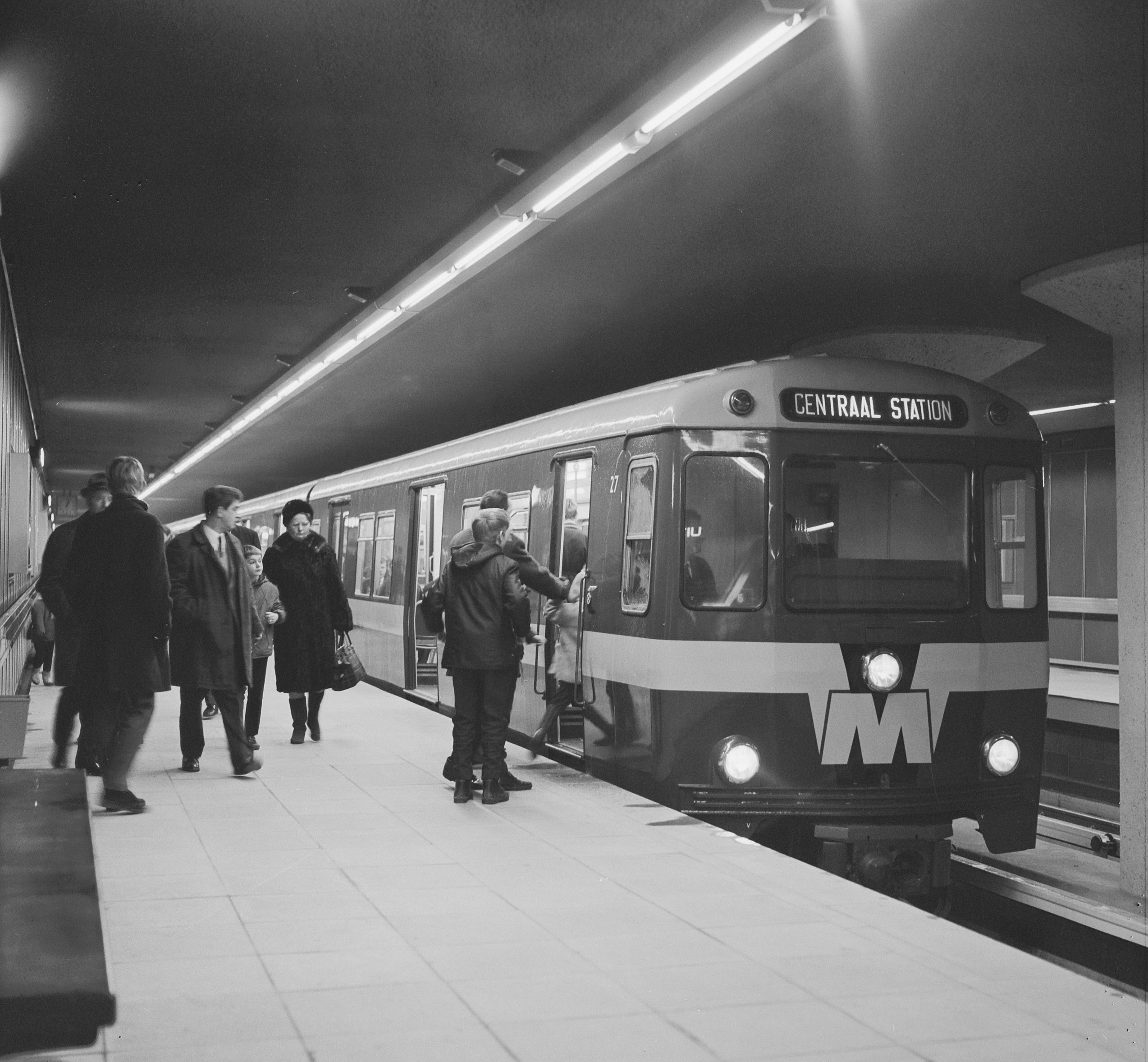 Collectie / Archief : Fotocollectie Anefo Reportage / Serie : [ onbekend ] Beschrijving : Gratis in metro in Rotterdam. Drukte op het Beursstation. Beursstation Datum : 3 januari 1968 Locatie : Rotterdam, Zuid-Holland Trefwoorden : metro's Fotograaf : Behrens, Herbert / Anefo Auteursrechthebbende : Nationaal Archief Materiaalsoort : Negatief (zwart/wit) Nummer archiefinventaris : bekijk toegang 2.24.01.03 Bestanddeelnummer : 920-9641